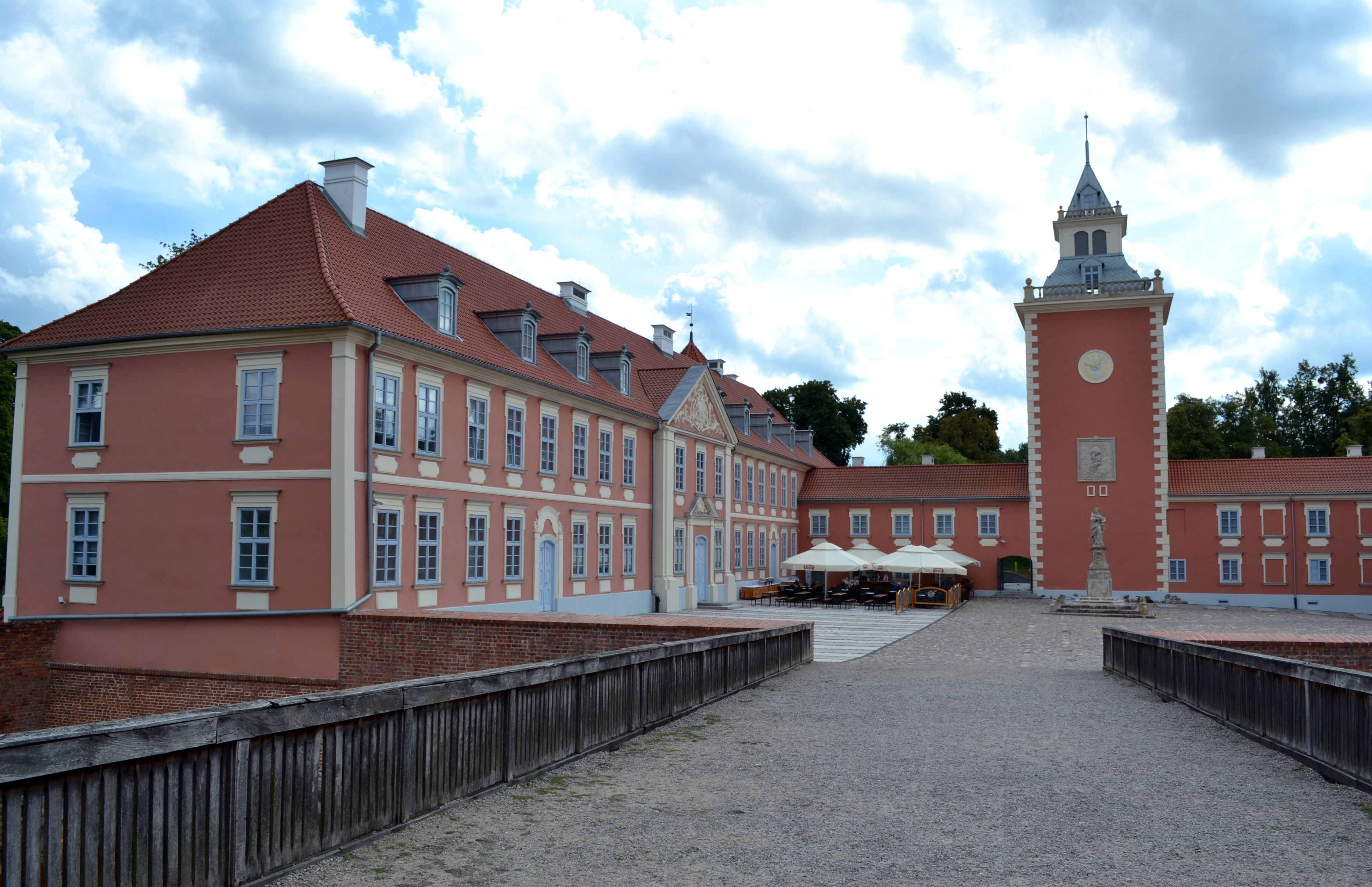 Lidzbark Warmiński, zespół zamku biskupiego, XIV, XIX